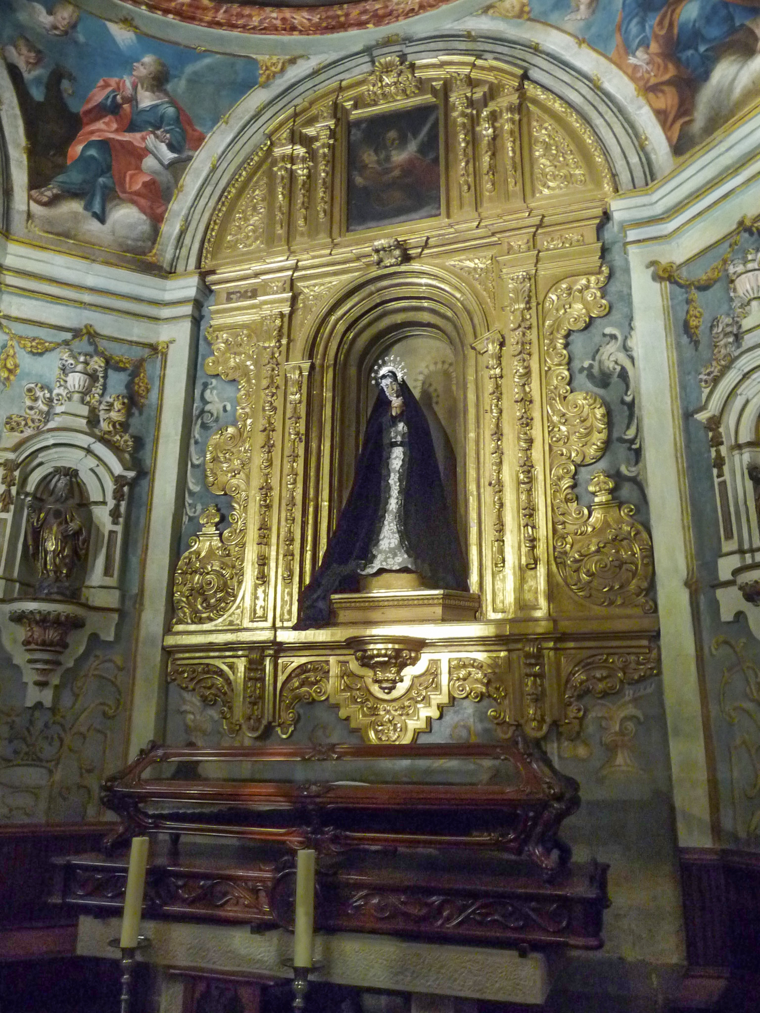 Iglesia de Santo Tomás. Haro, La Rioja (España) - Retablo de La Dolorosa en la Capilla de la Soledad. A sus pies el Santo Sepulcro.